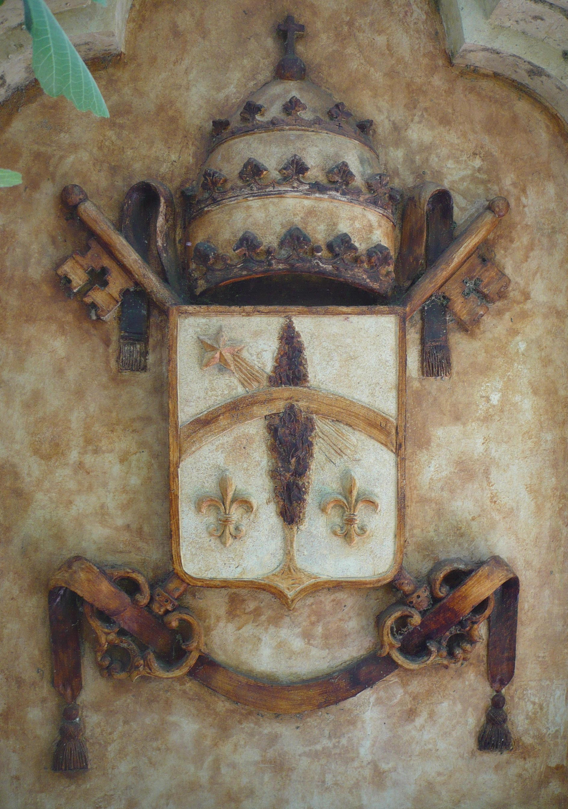 Armoiries du pape Léon XIII, sur un mémorial datant de 1902 à l'église de l'Immaculée-Conception, quartier Bonnefoy, Toulouse, France.